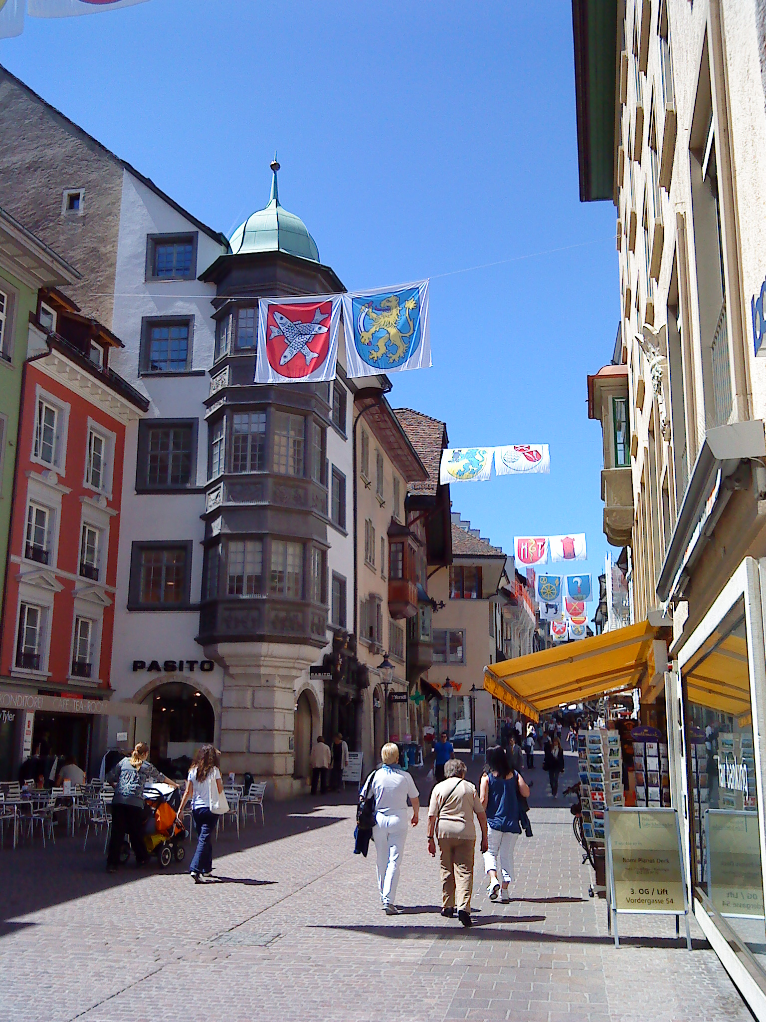 Vordergasse, Schaffhausen/Schweiz. Ehemaliges Zunftgebäude der Zunft zun Schmieden, Schaffhausen. Erste Erwähnung 1393, prächtiges Portal und stolzer Turmerker von 1653, Verkauf 1848. Festlicher Fahnenschmuck mit Wappen der 12 alten Schaffhauser Zünfte und Gesellschaften, anlässlich des Jubliläums "600 Jahre Schaffhauser Zünfte und Gesellschaften, 1411 - 2011".